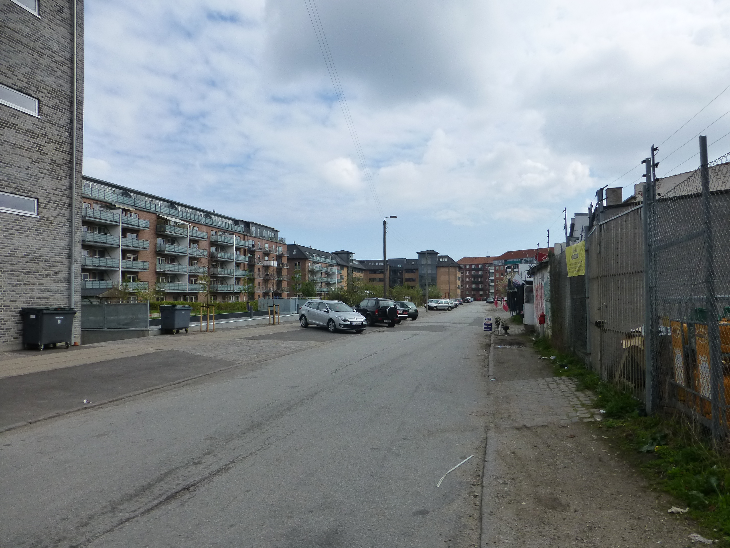 The street Omøgade in Østerbro in Copenhagen.